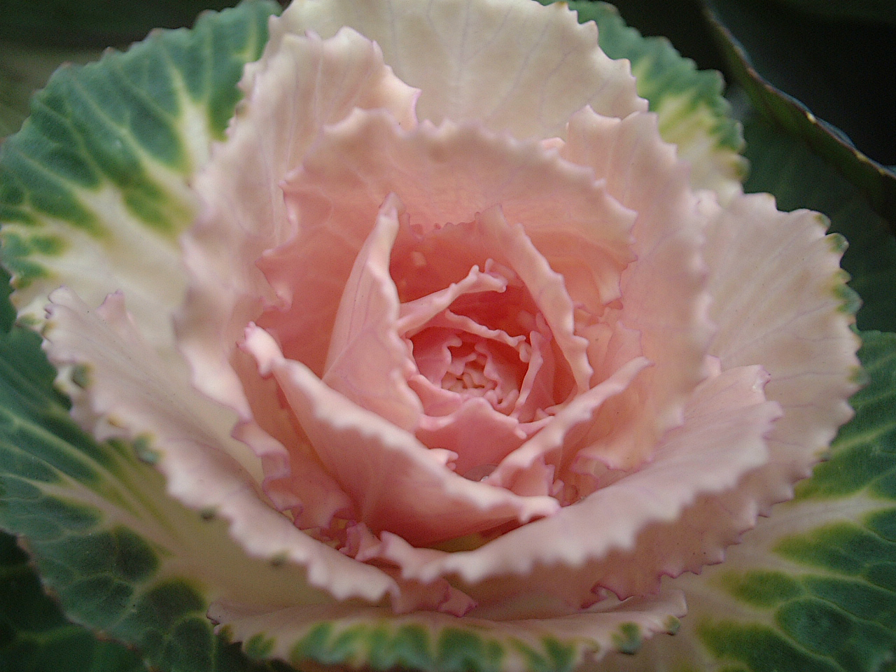 Brassica oleracea var. acephala